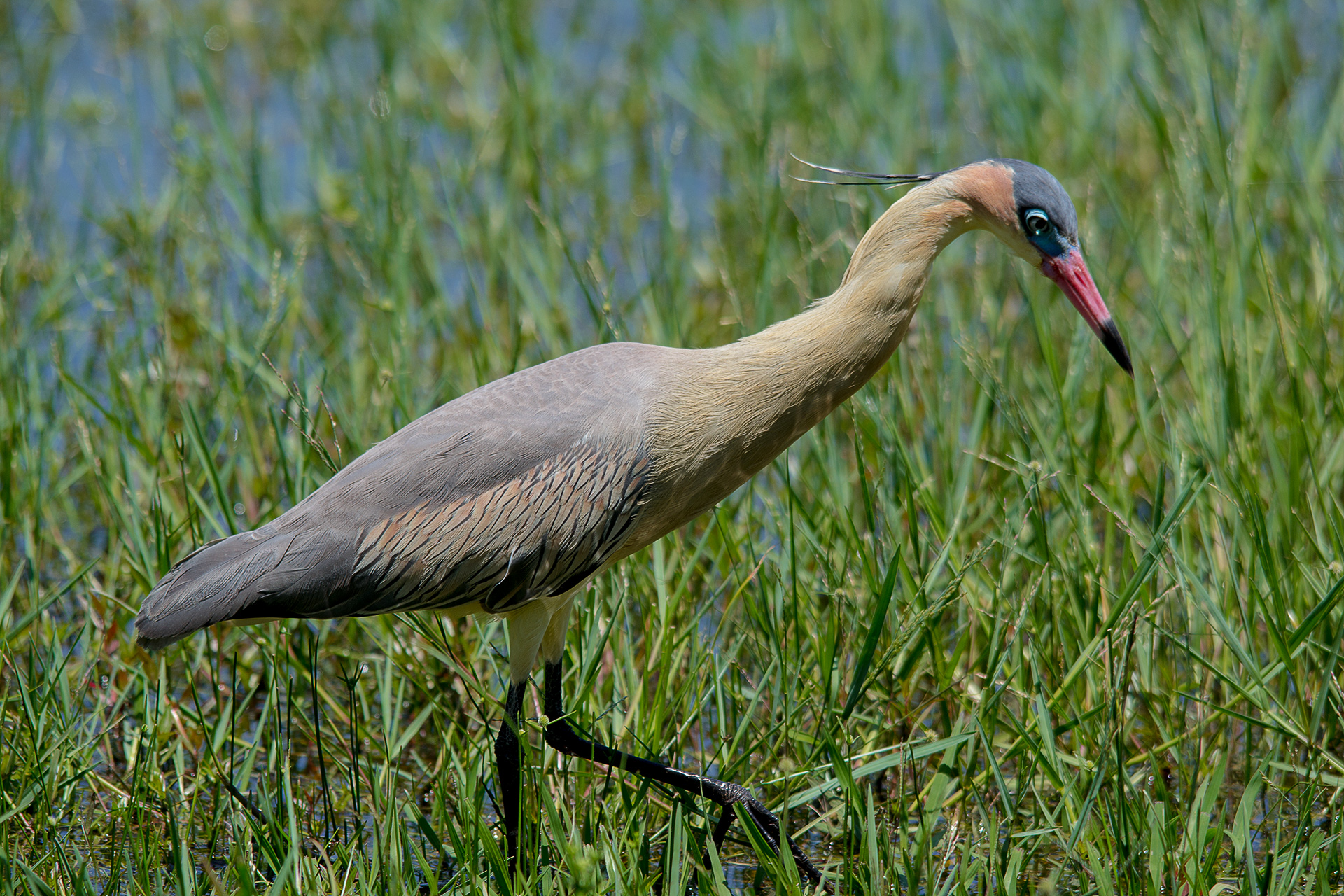 Ave alimentava-se tranquilamente em uma lagoa na cidade de Três Lagoas, interior do Mato Grosso do Sul.